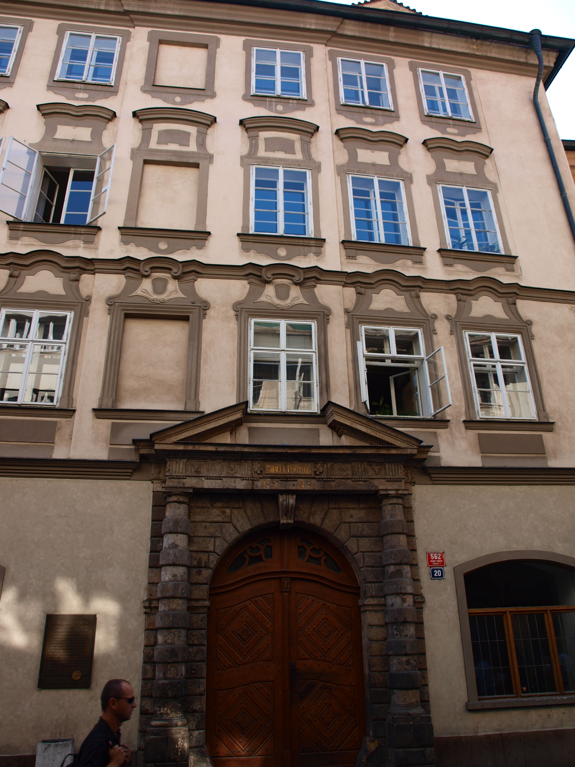 Buquoyský palác (Celetná)